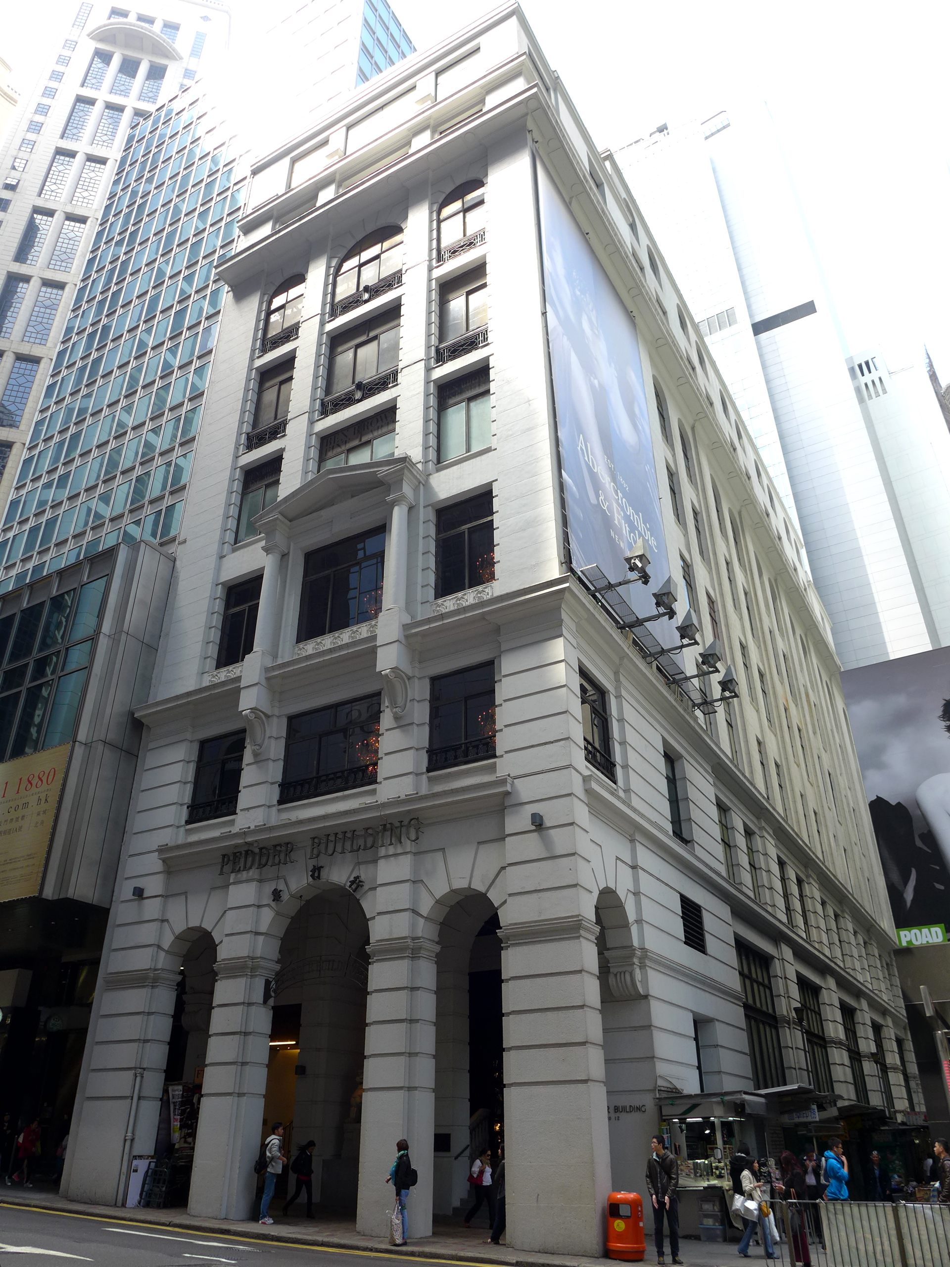 Pedder Building 畢打行